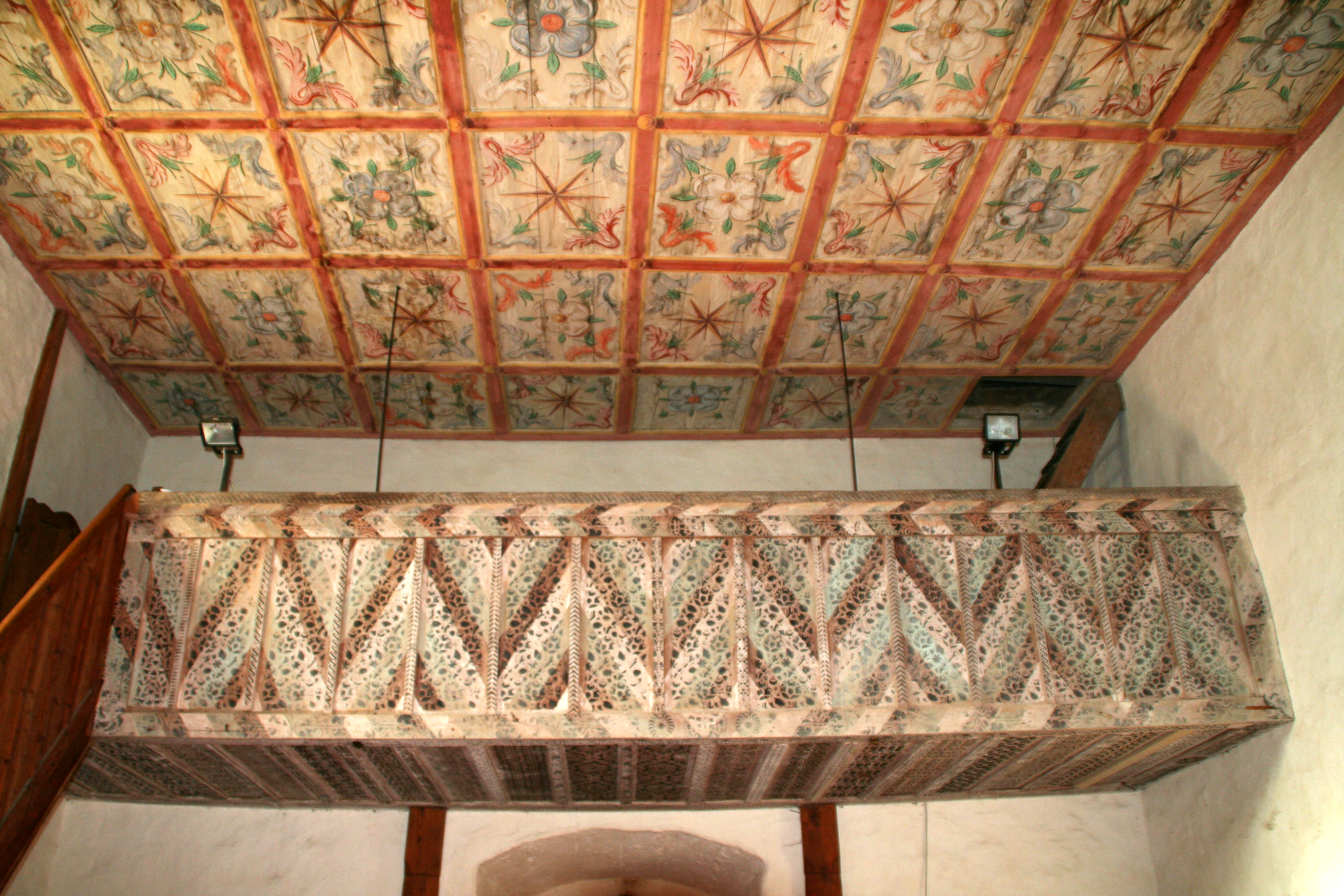 Filialkirche St. Leonhard in der Ebene, St. Lorenzen ob Eibiswald: Empore und Kassettendecke